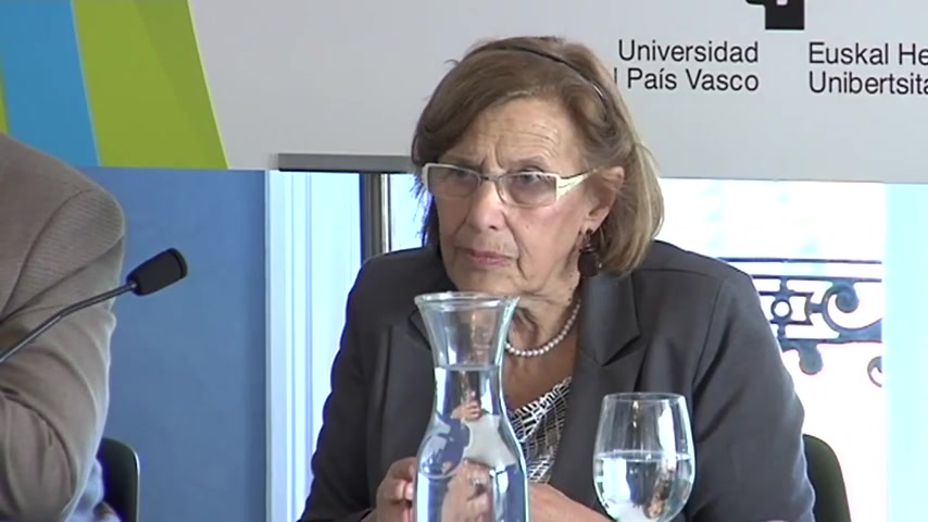 Jornada sobre Justicia Transicional, celebrada en el palacio de Aiete, San Sebastián. 17 de octubre 2013. Segundo bloque: Decretos de víctimas de violaciones de derechos humanos: balance y perspectiva de futuro'